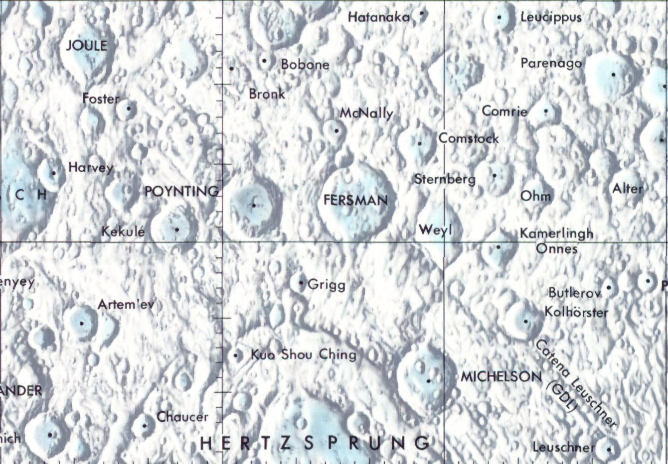 Cráter lunar Fersman. Localización. (Imagen Mapa lunar NASA)